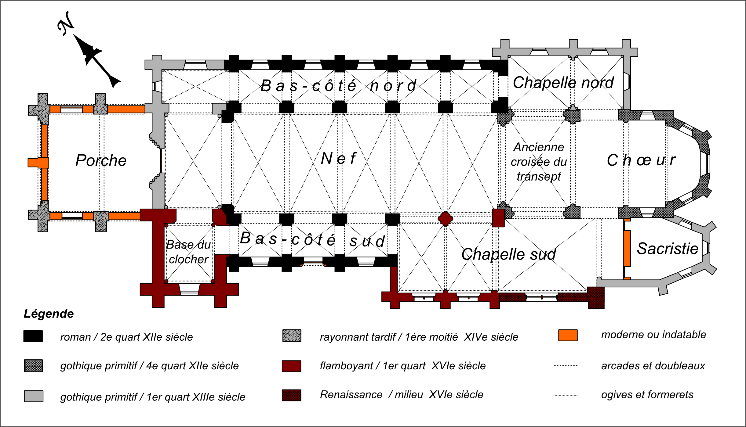 Plan schématique de l'église. En l'absence d'un plan à l'échelle dans les archives de la mairie et la médiathèque du Patrimoine : dimensions générales d'après le cadastre, disposition détaillée d'après les photos.